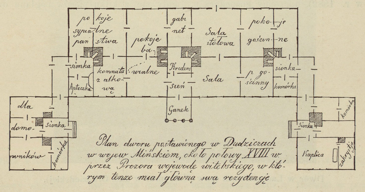 Беларуская (тарашкевіца): Дудзічы (Dudzičy), сядзіба Ельскіх (Jelski)